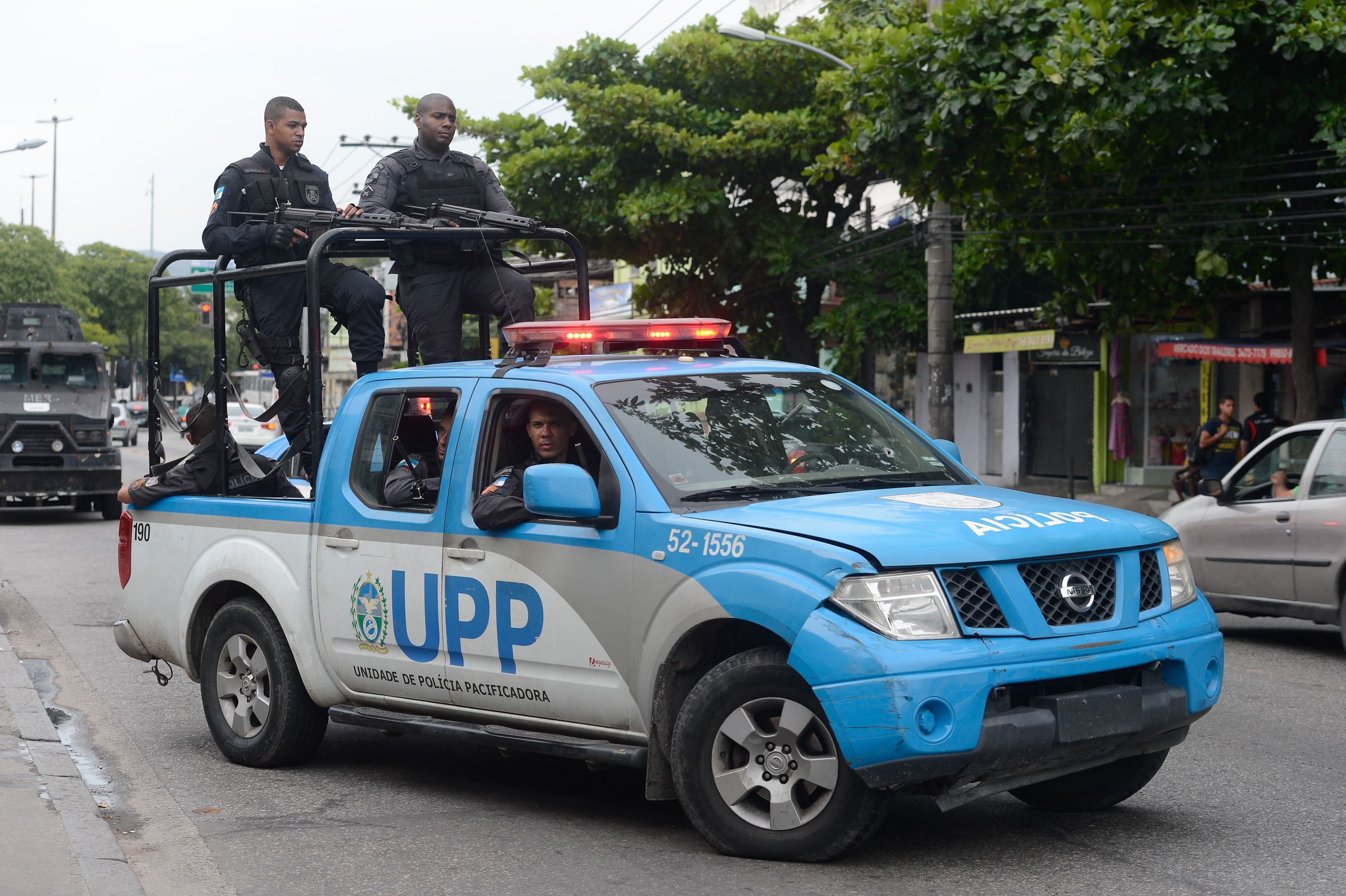 Unidade de Polícia Pacificadora na Cidade de Deus